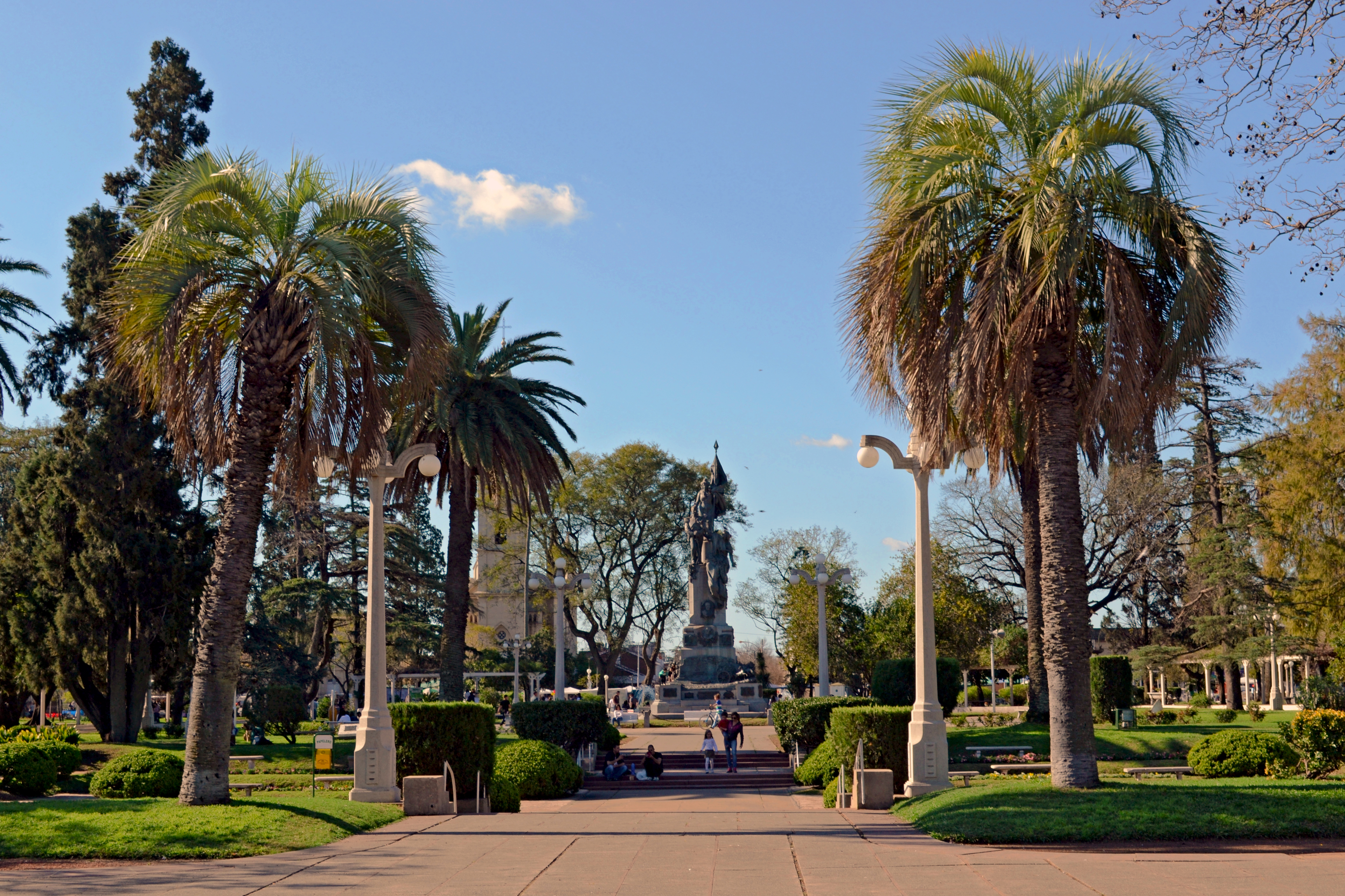 Plaza de la Ciudad de Esperanza